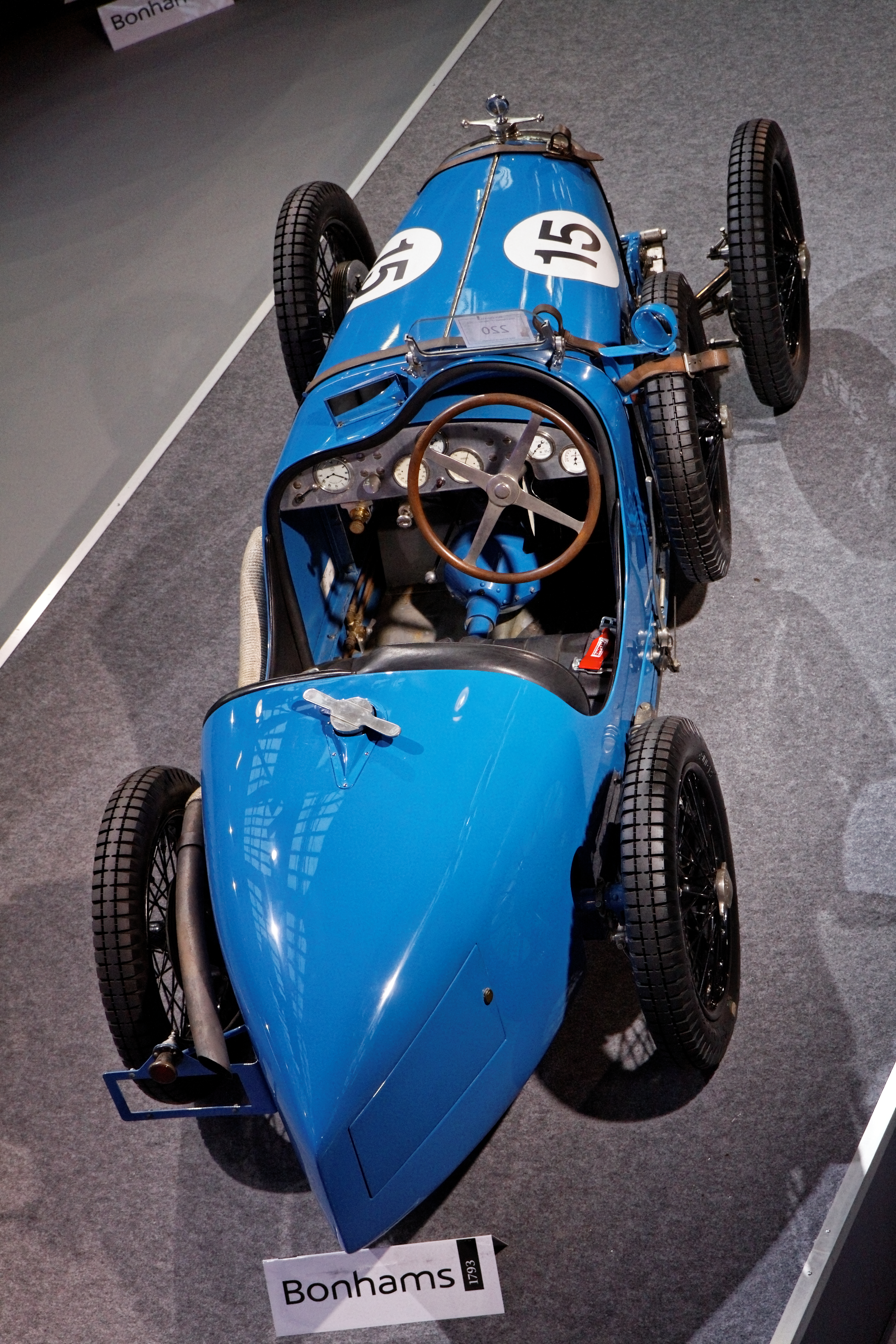 Amilcar C6 Voiturette